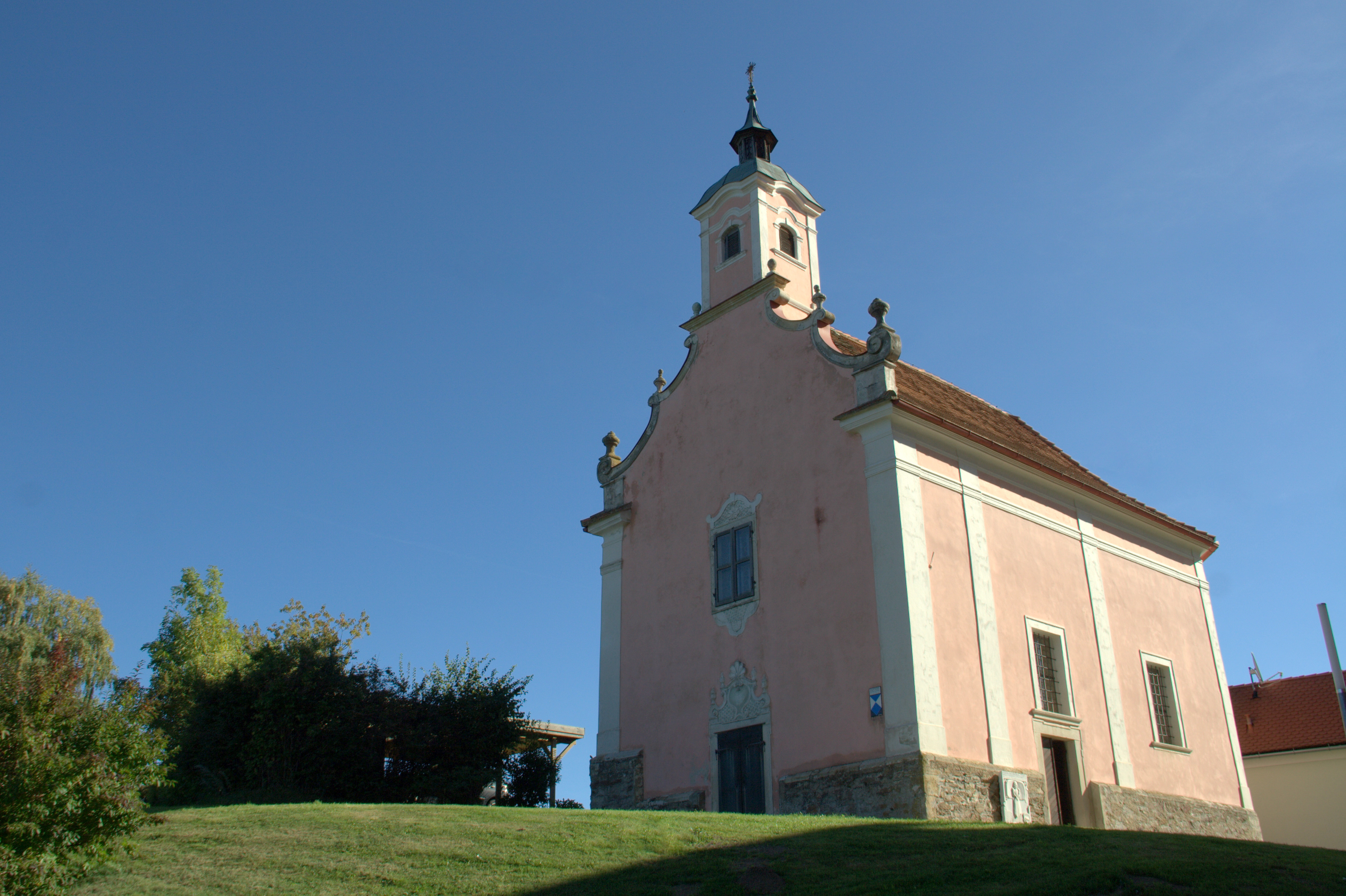 Kath. Filialkirche, Annenkapelle